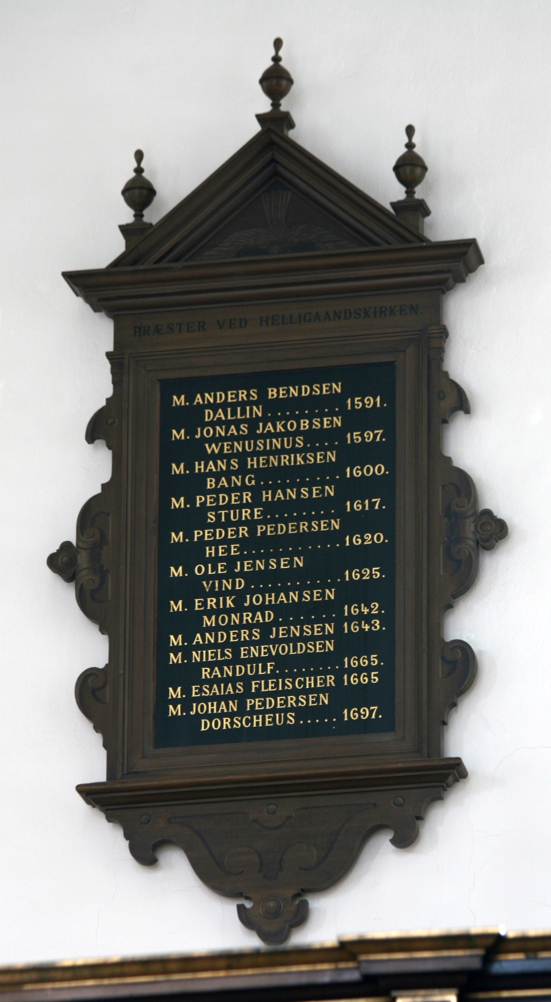 Helligåndskirken, Copenhagen, Denmark. Series pastorum, part 2. 1591-1697.